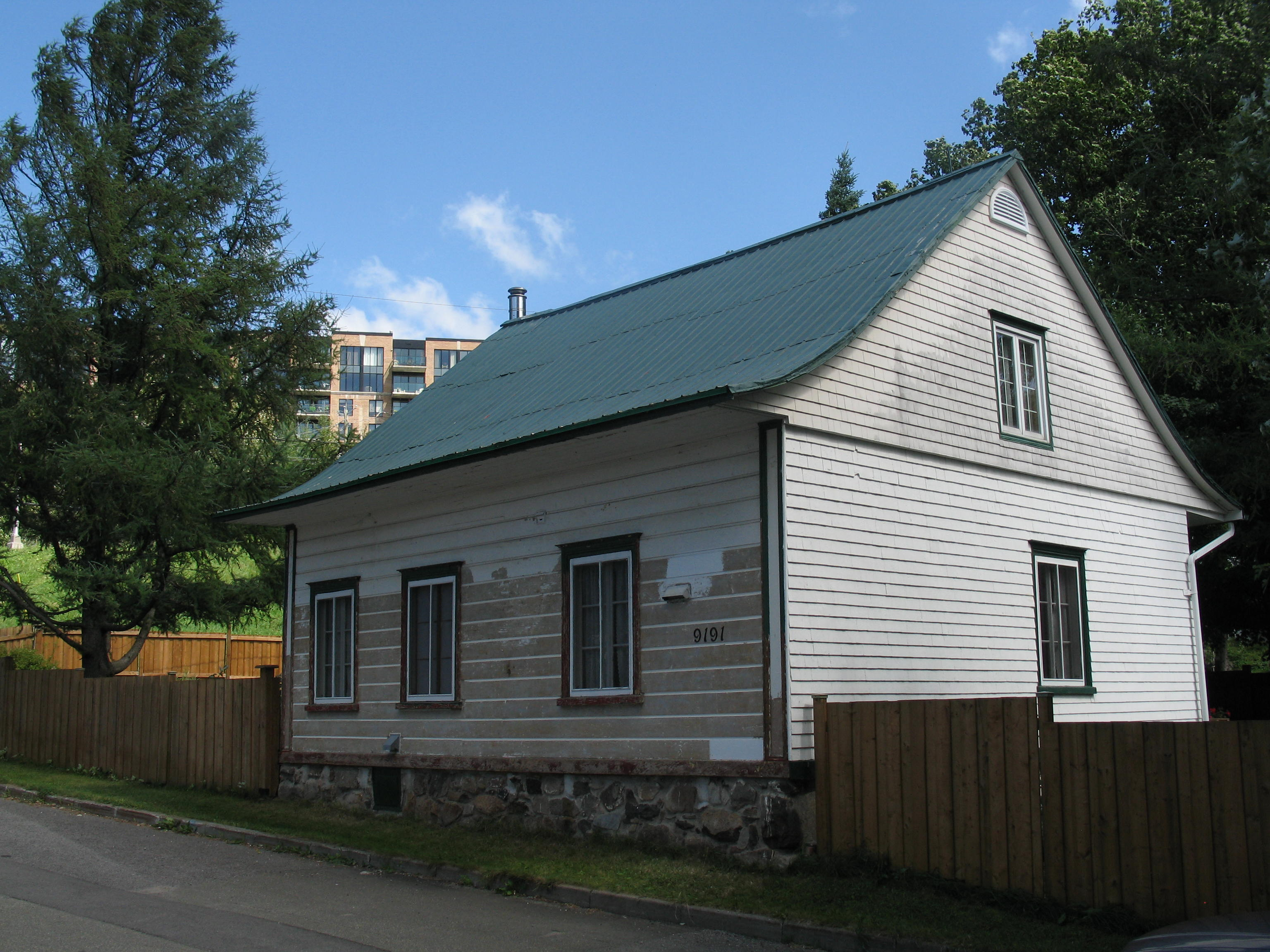 La résidence du 9191, place Hector-Laferté dans l'arrondissement Charlesbourg de la ville de Québec est une résidence de ferme d'inspiration néoclassique construite dans la seconde moitié du XIXe siècle. Elle se distingue notamment par le fait qu'elle fasse face au sud, malgré sa position par rapport à la voie publique.